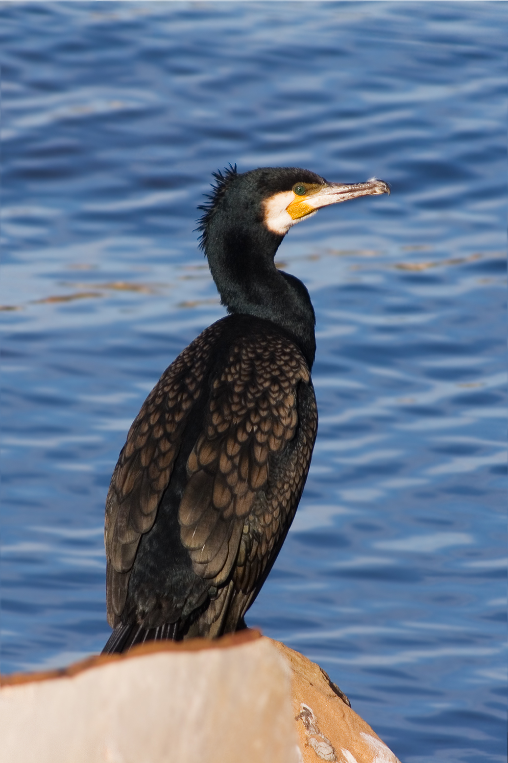 1.2 only